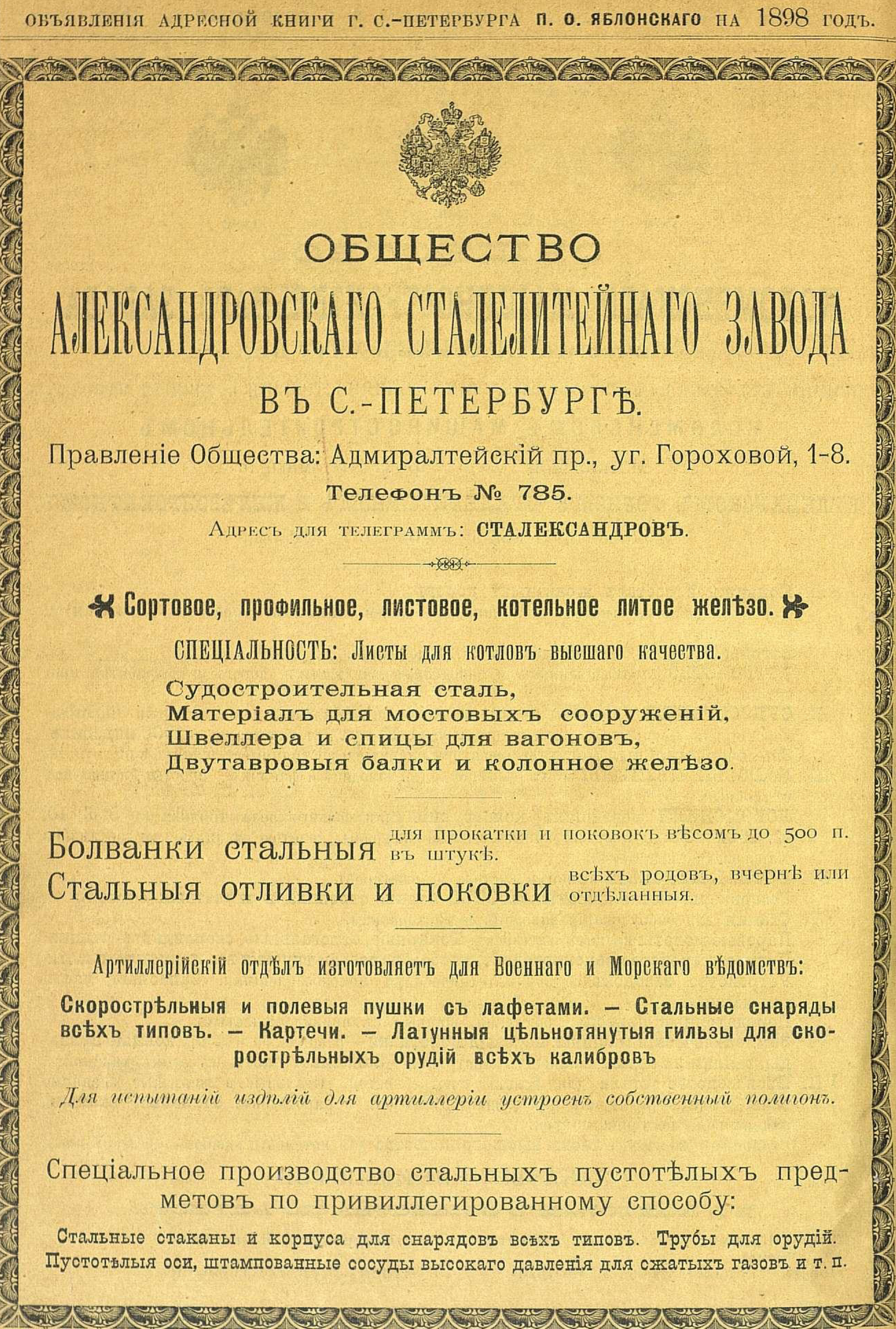 Реклама Александровского сталелитейного завода, 1898 год.